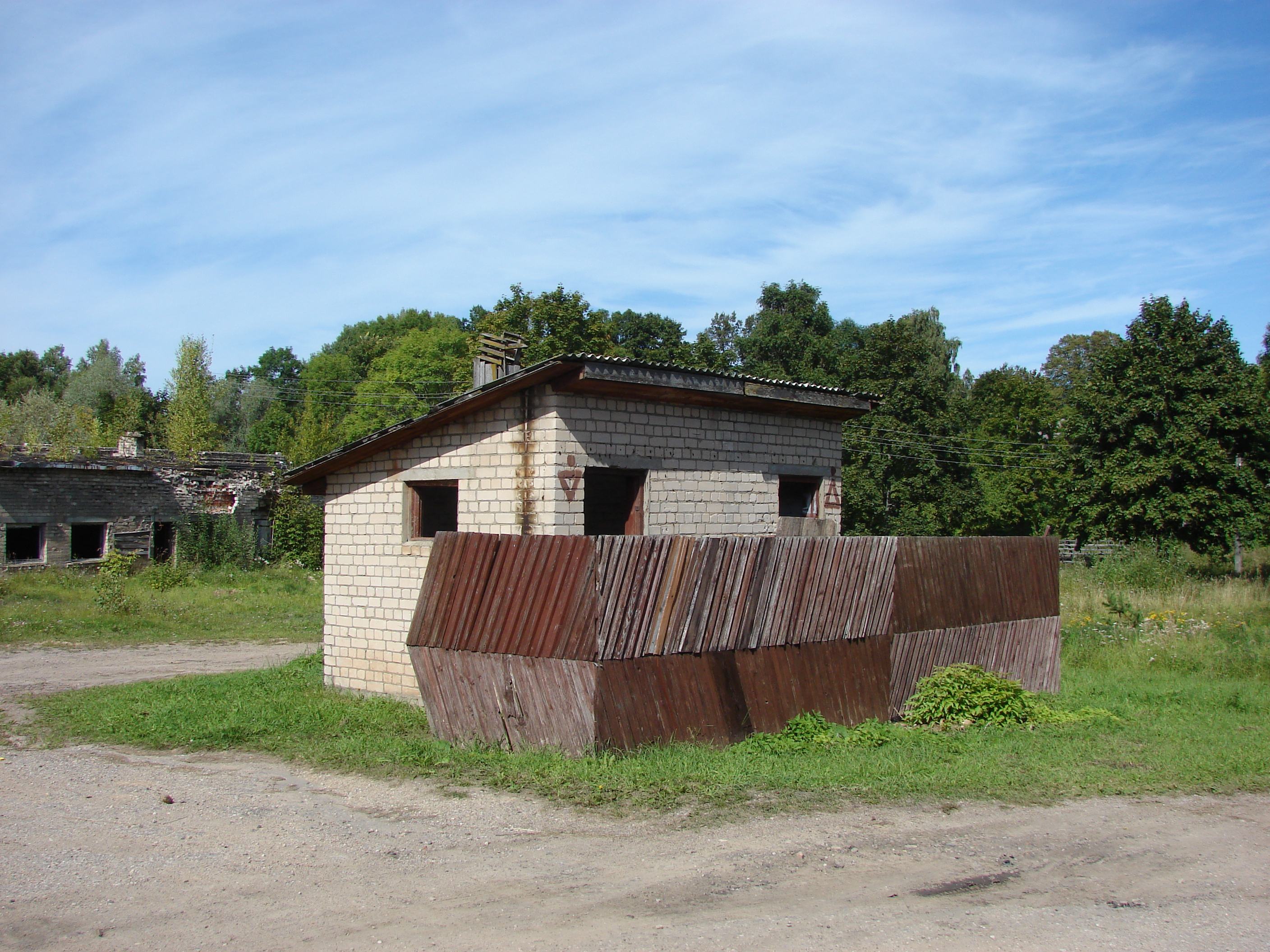 Skaistas labierīcības, Skaista, Skaistas pagasts, Krāslavas novads, Latvia